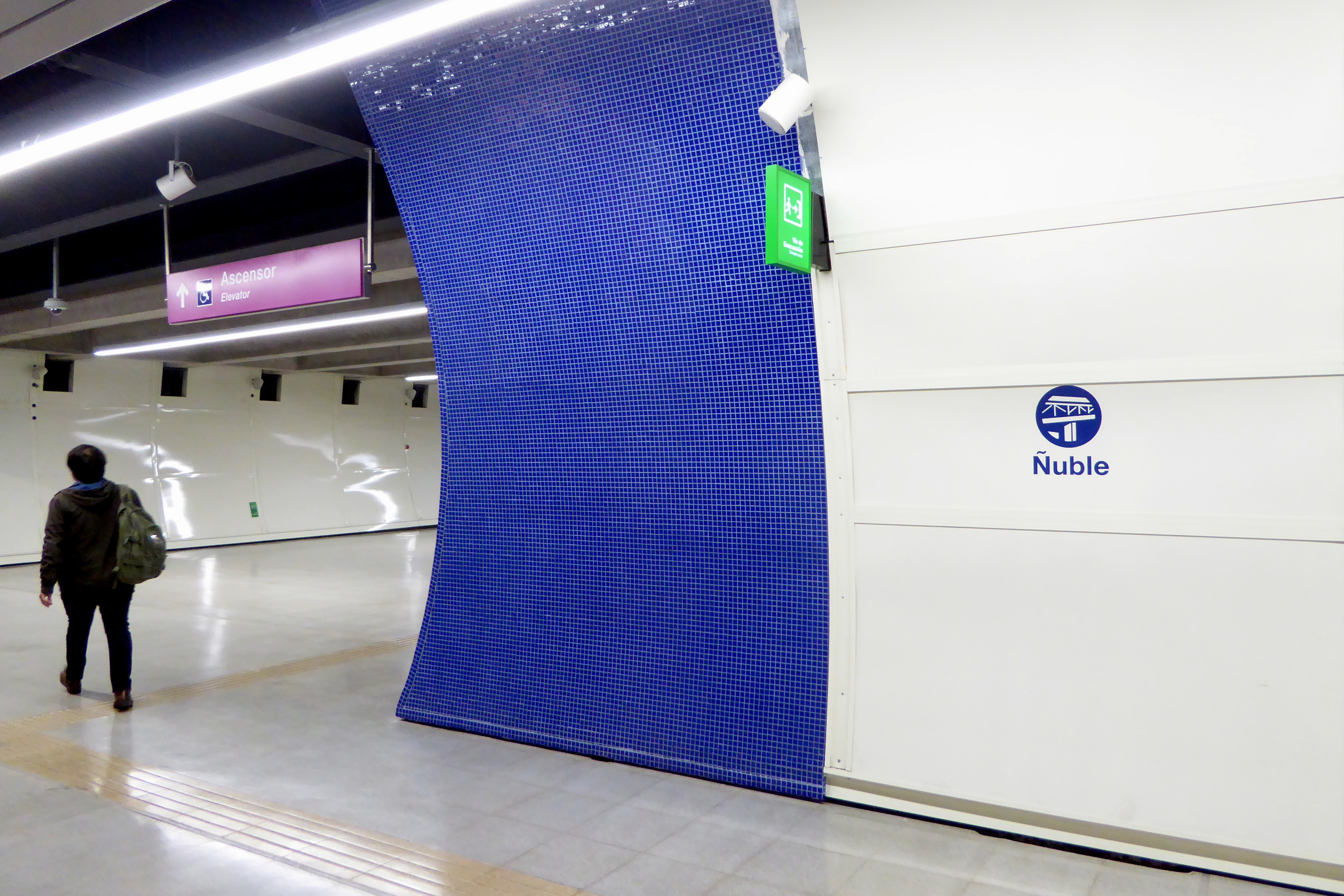 Vista del andén dirección Los Leones en Ñuble, Línea 6 del Metro de Santiago.